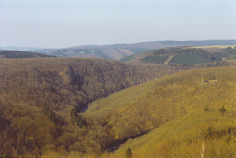 self made